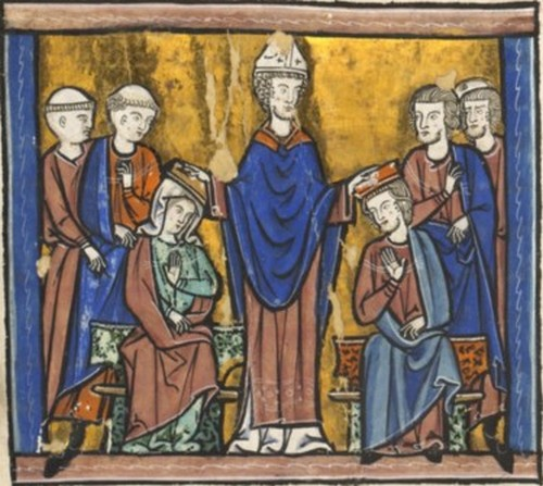 Couronnement d'Amaury Ier